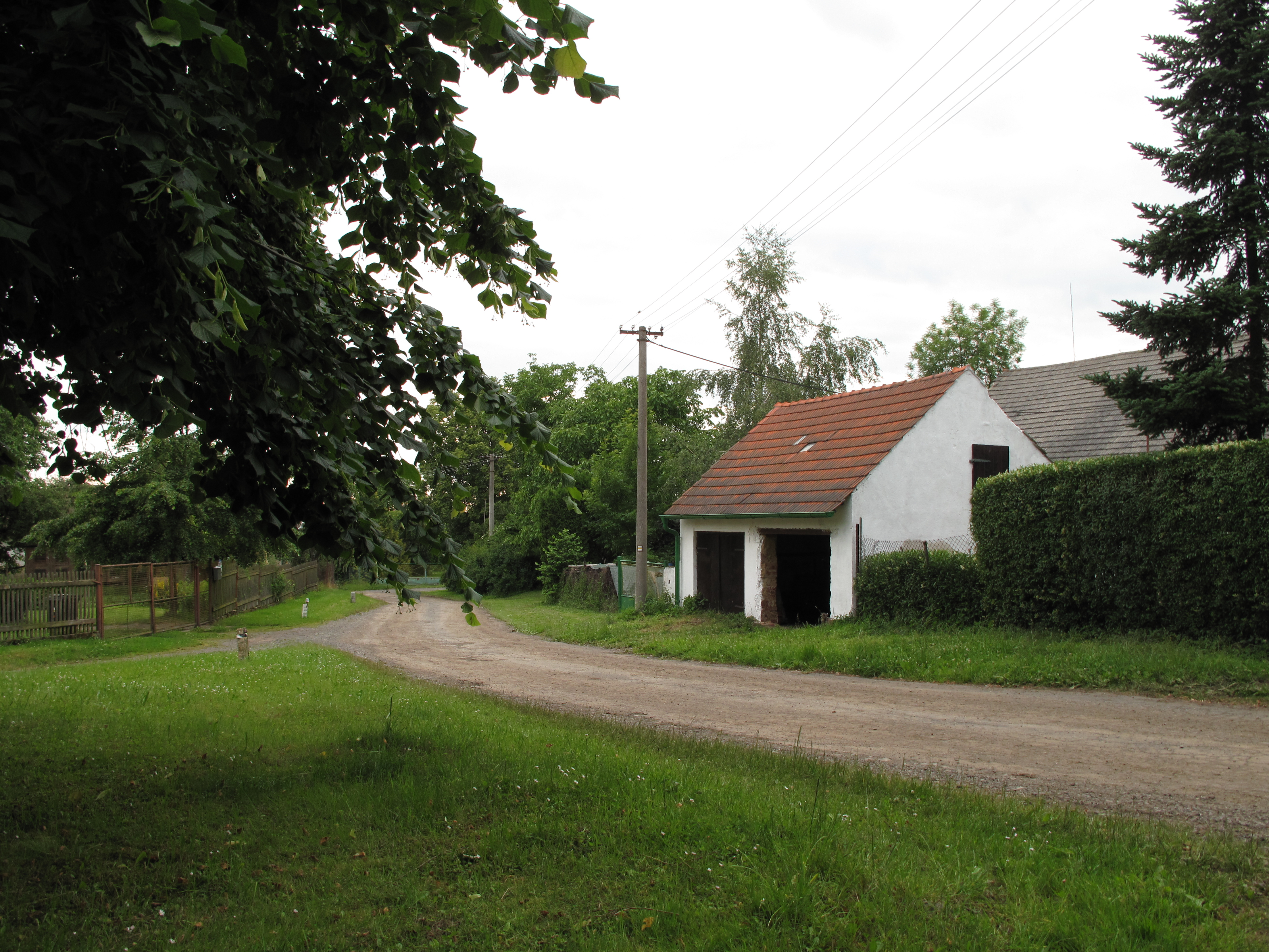 Chalupa v Hořicích. Okres Plzeň-jih, Česká republika.